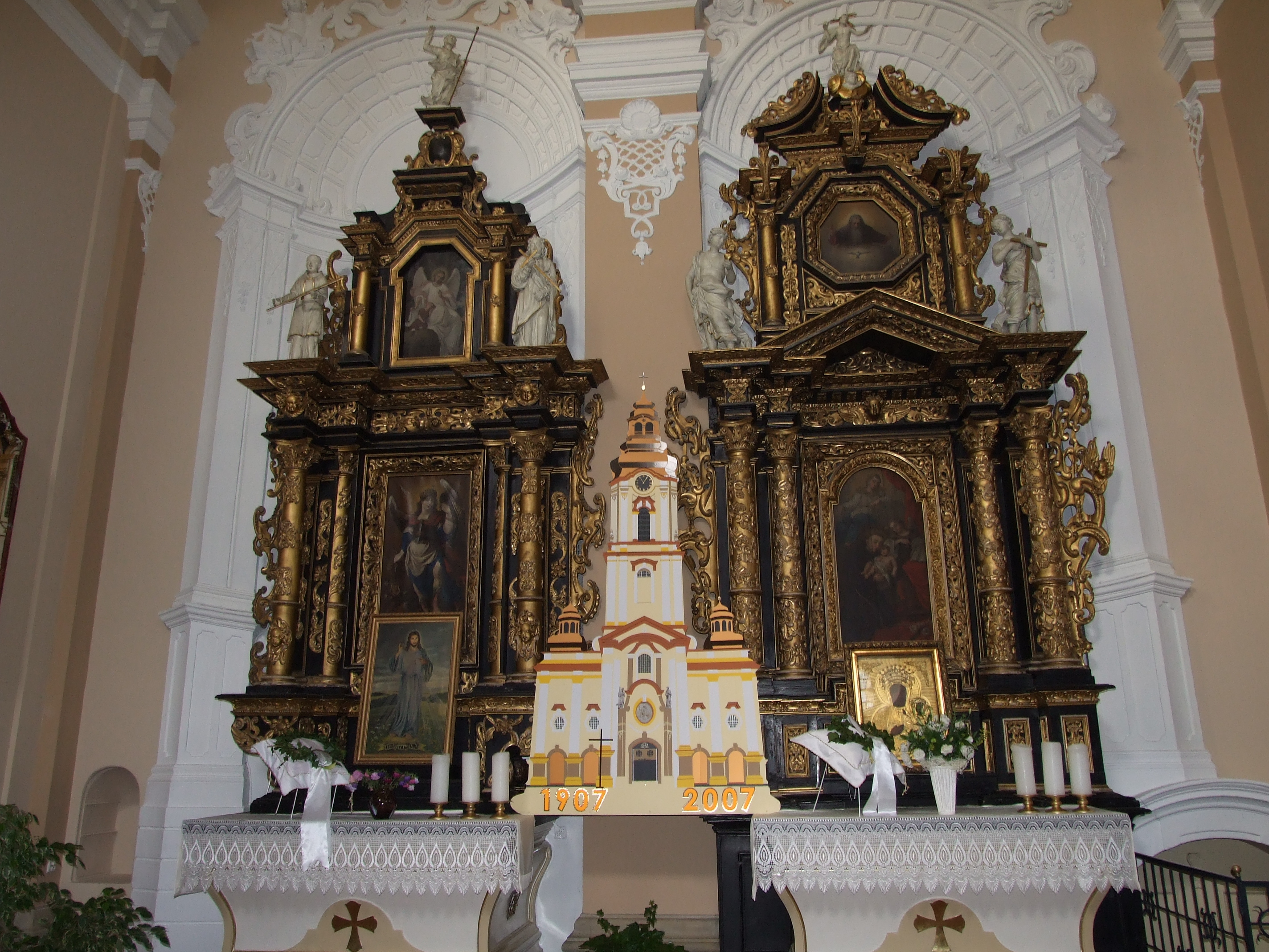 Kościół św. Wawrzyńca w Strzelcach Opolskich